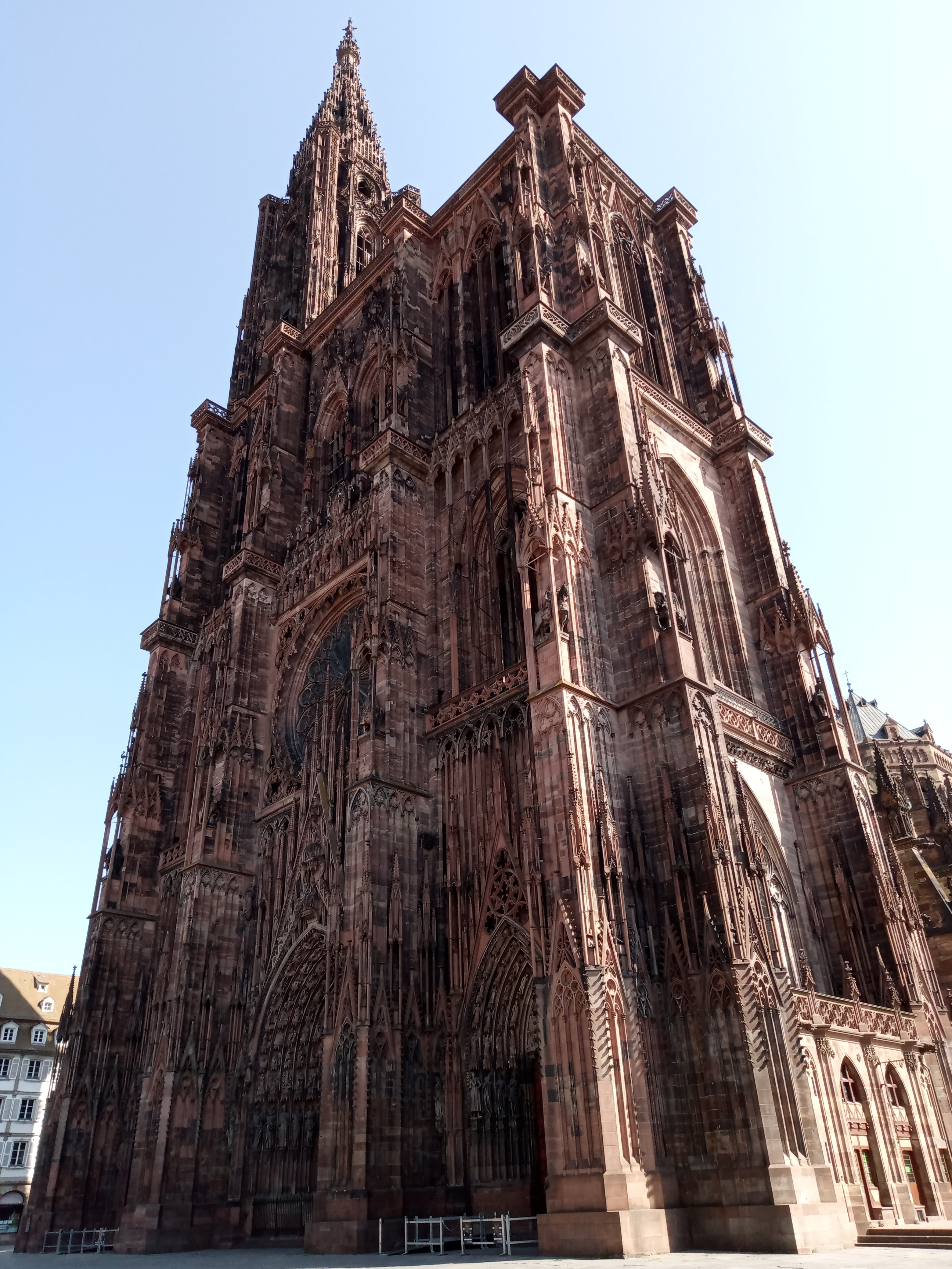 Façade de la cathédrale de Strasbourg